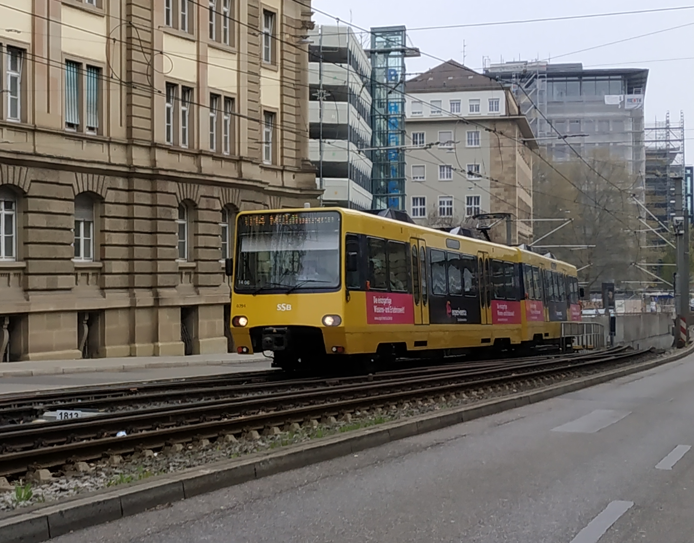 Rame du tram/métro de Stuttgart